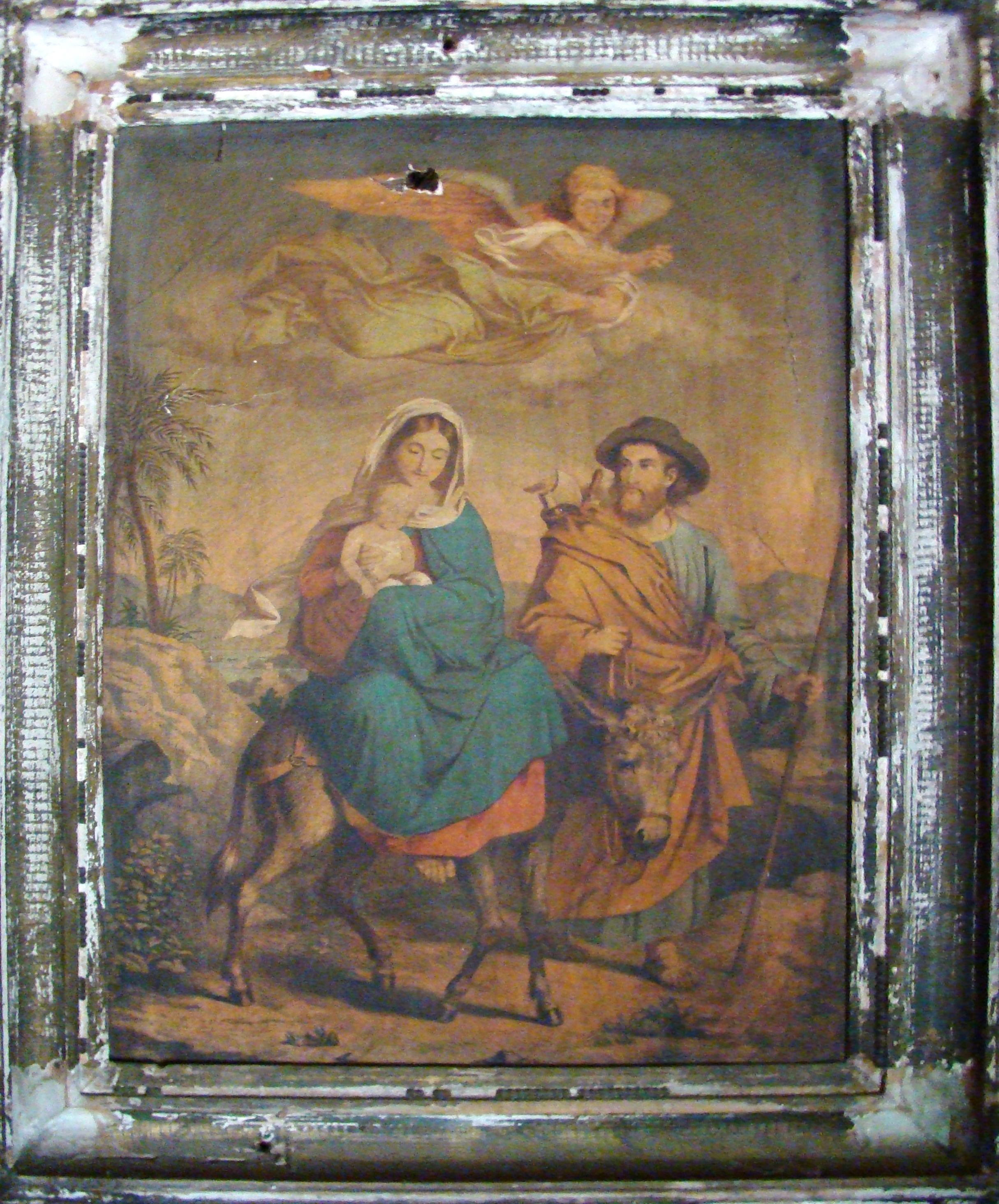 Biserica de lemn „Sfinții Arhangheli” din Săliștea, județul Alba